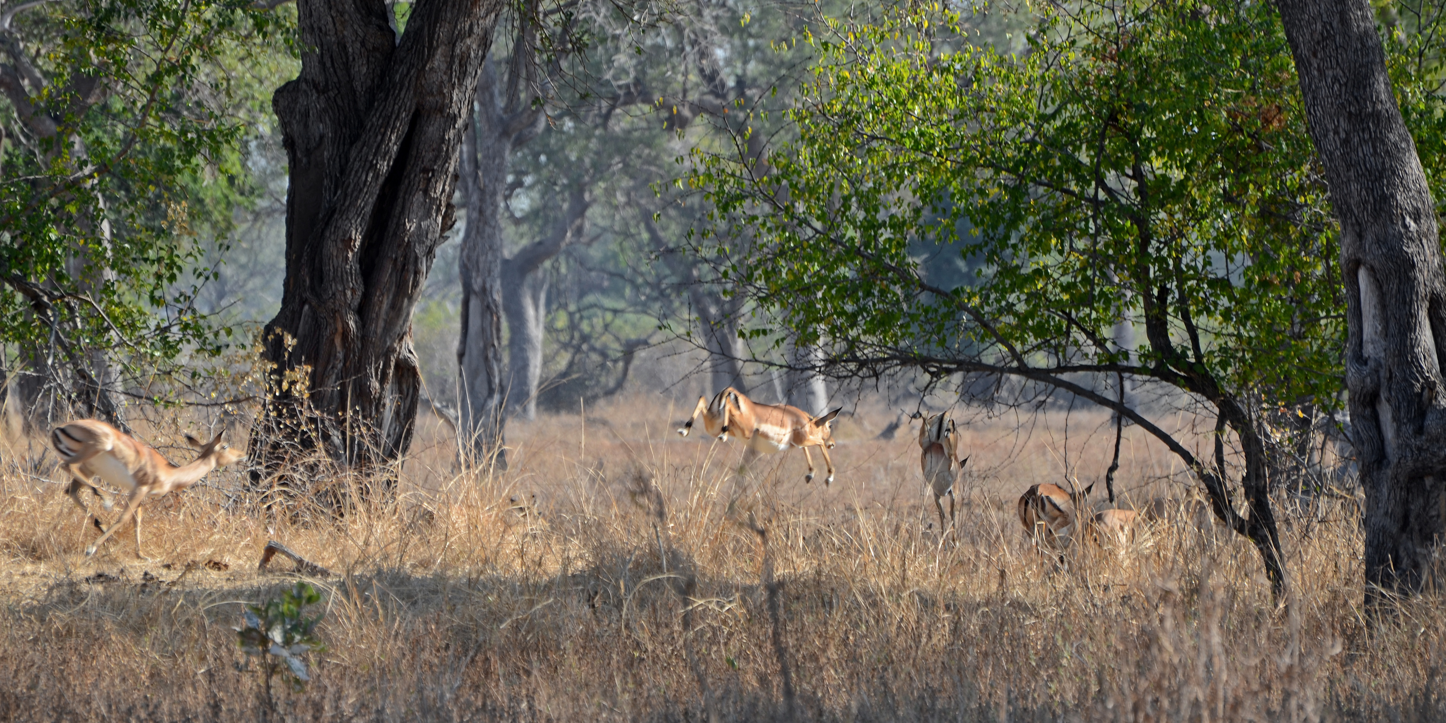 Bovidae: Aepyceros melampus South Luangwa National Park, Zambia